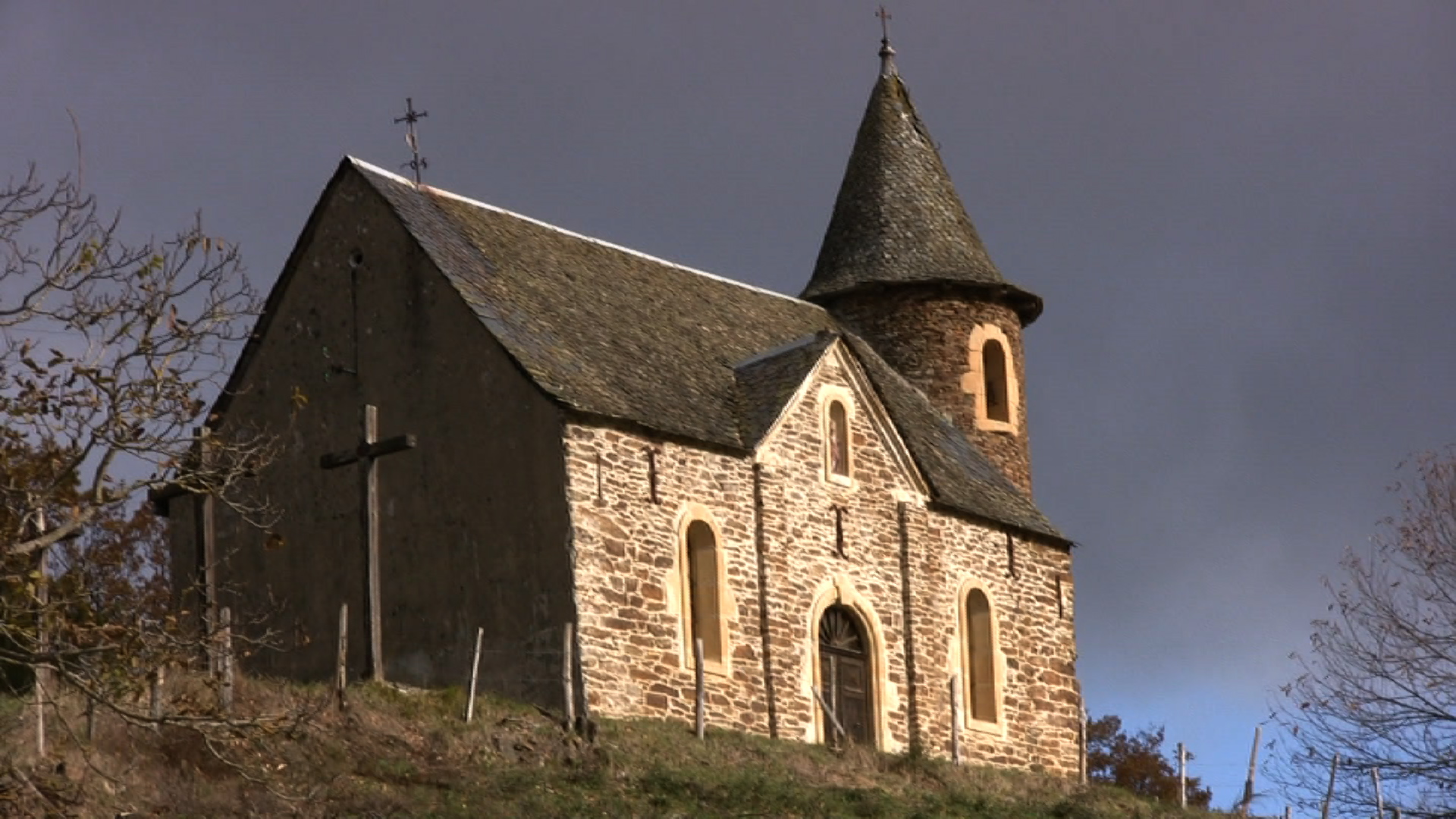 Chapelle du calvaire, (Pomayrols, Aveyron, France). Construite en 1788, relevée en 1880, restaurée en 1988.